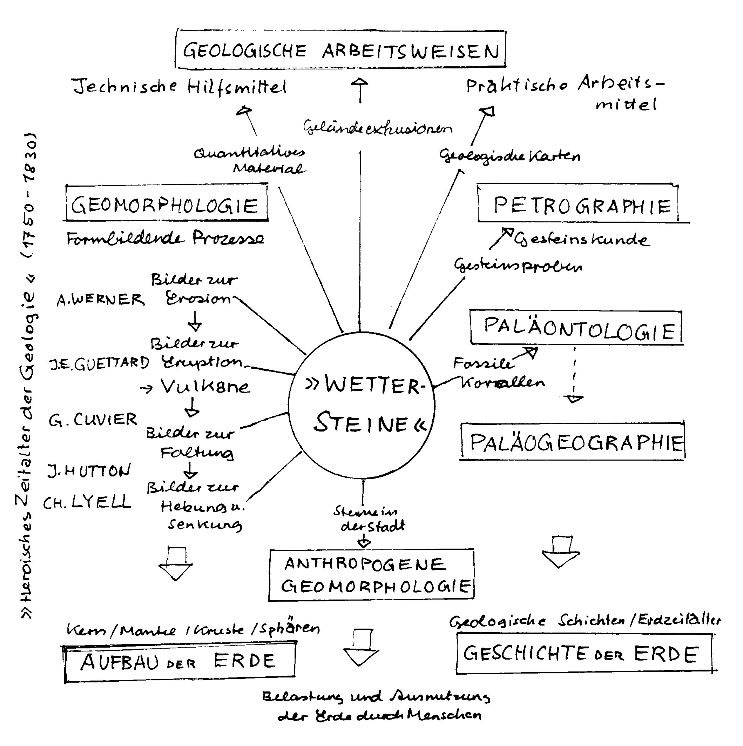 "Thematische Landkarte" des auf Martin Wagenschein basierenden Lehrstücks "Wettersteine" (1997)